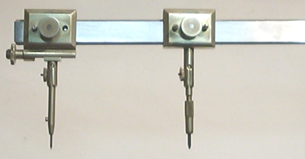 photo personnelle